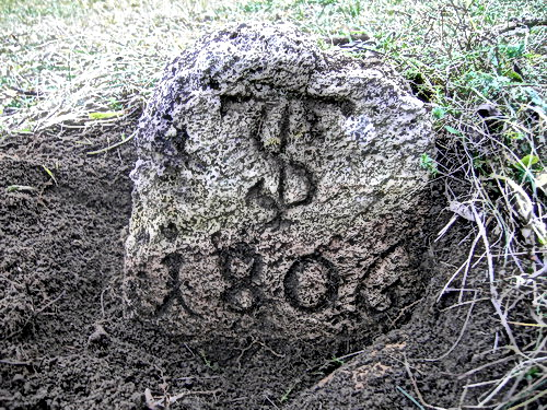 Triftstein für die Weidetrift auf dem Kalvarienberg in Bad Tölz